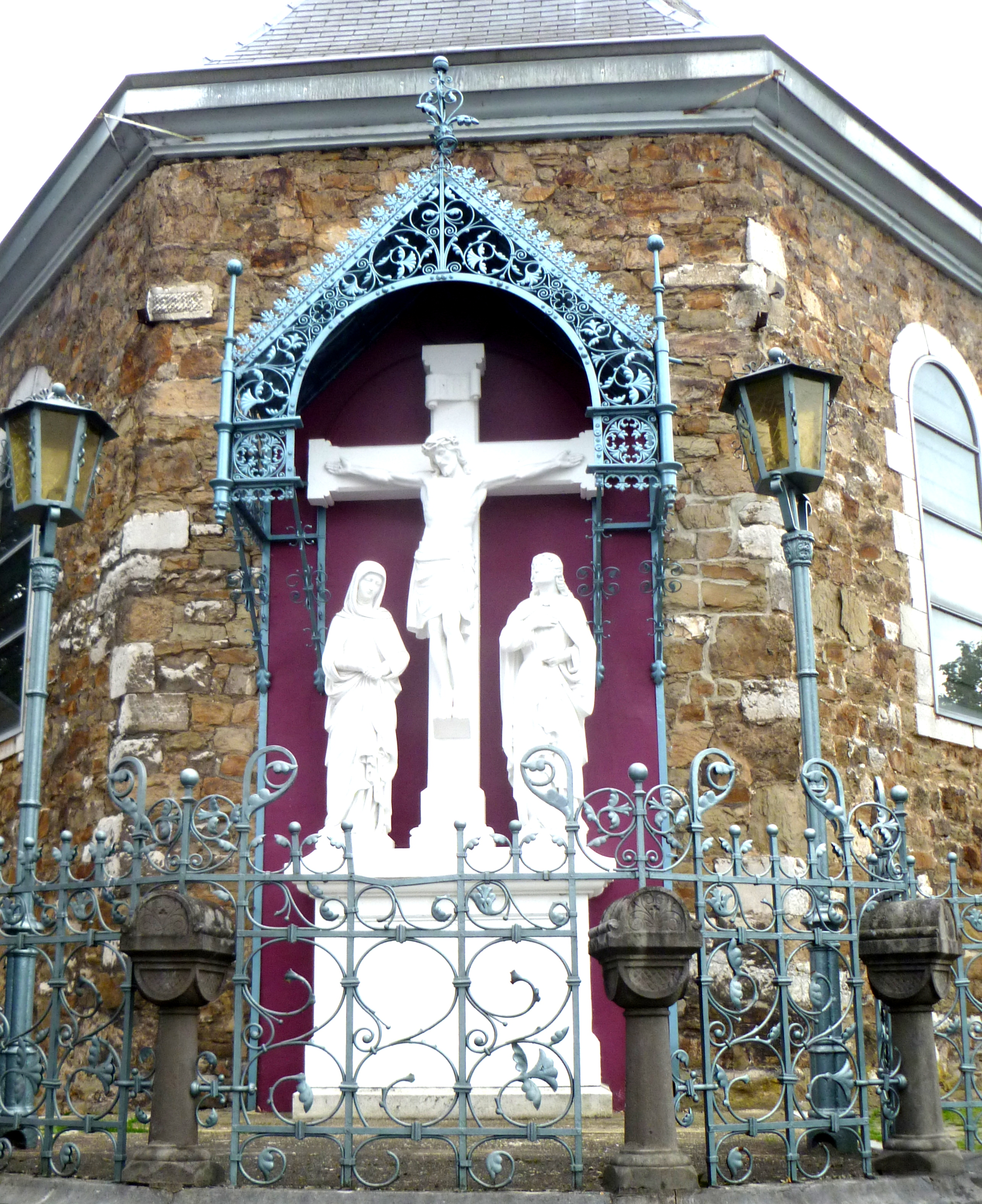 Golgatha Skulpturen Bergkapelle Eupen; Bildhauer: Gustav Angelo Venth, Aachen, 1885